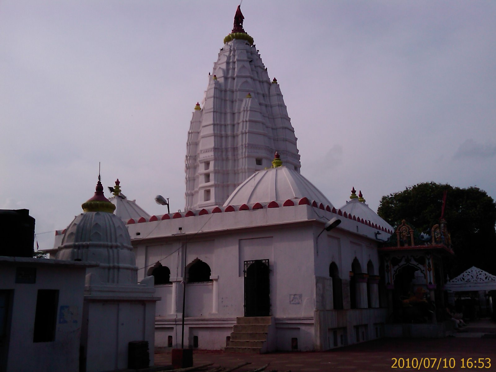 Samlei Gudi (Samaleswari Temple)